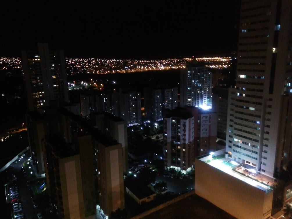 Imagem Fotografada de um prédio em Águas Claras.